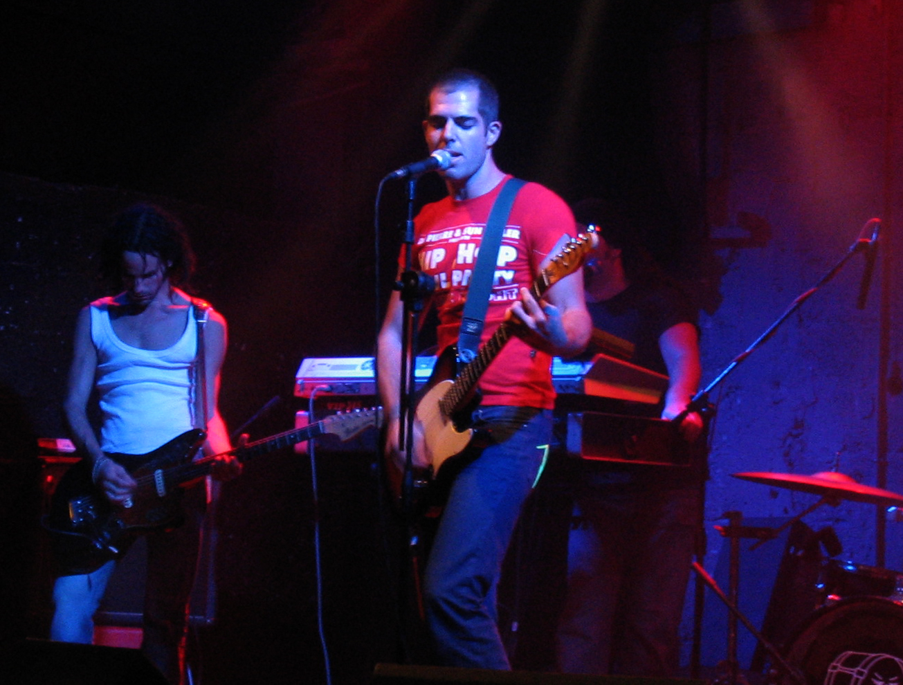 טל שגב בהופעה בתאטרון תמונע - ספטמבר 2003